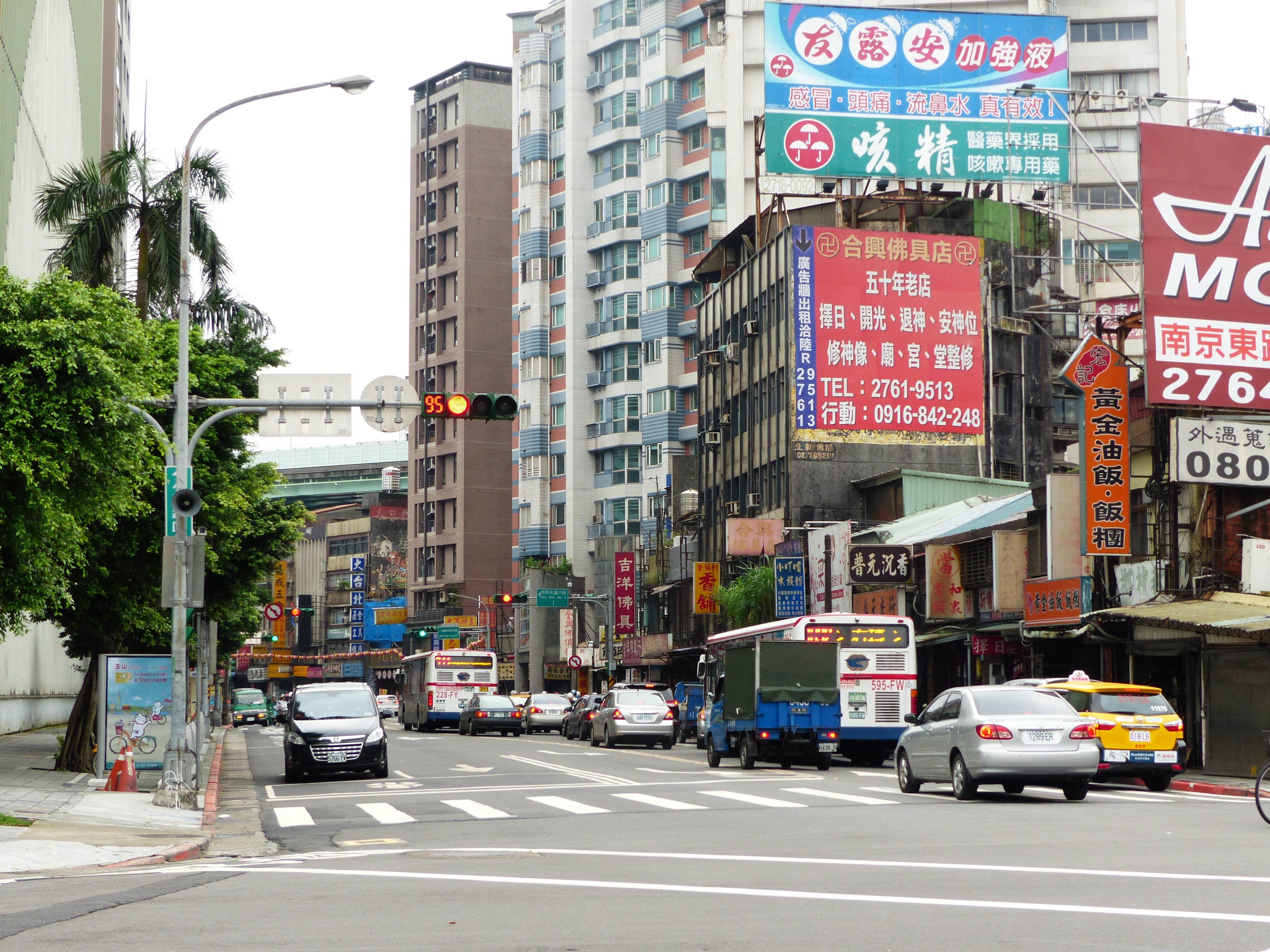 從臺北市松山區八德路四段與塔悠路、松信路口（饒河街夜市西口附近）西望八德路四段。八德路四段從基隆路一段到塔悠路間，是臺北市知名的香鋪、佛具店集中區。